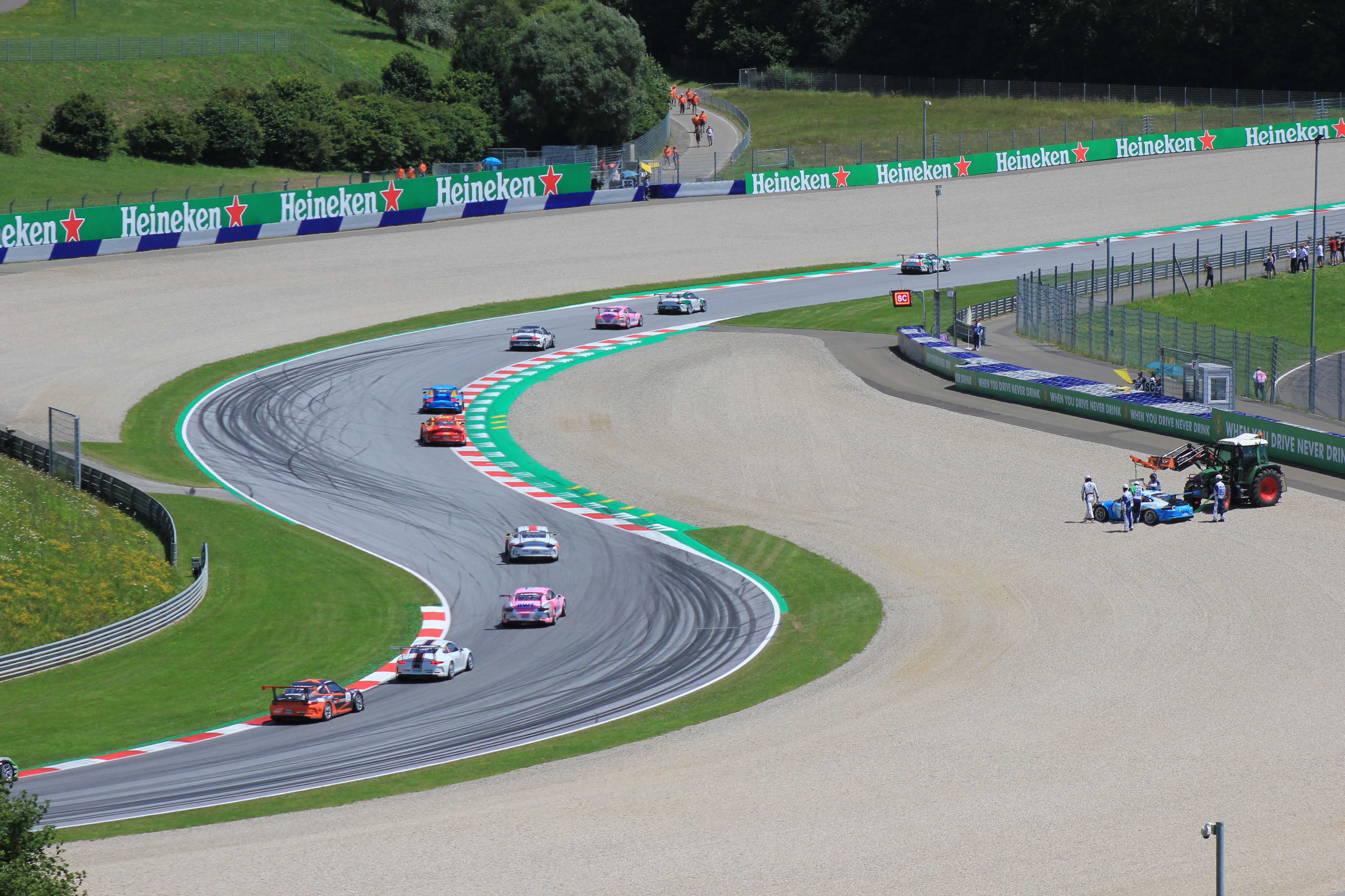 Safety-Car-Phase nachdem ein Wagen im Kies liegen blieb